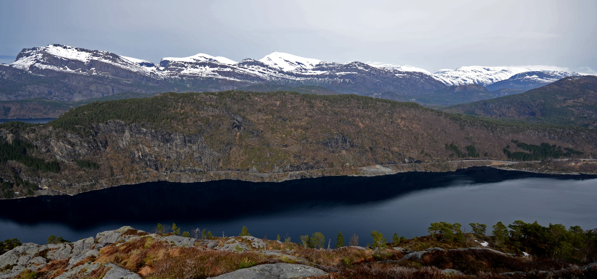 Fra Sandvikfjellet (427 moh) ser vi Uførefjellet rett i nord, på andre sida av Eikefjorden. Høyeste fjell i bakgrunnen er Haukåbøra (1065 moh), midt i bildet. Foto april 2011.